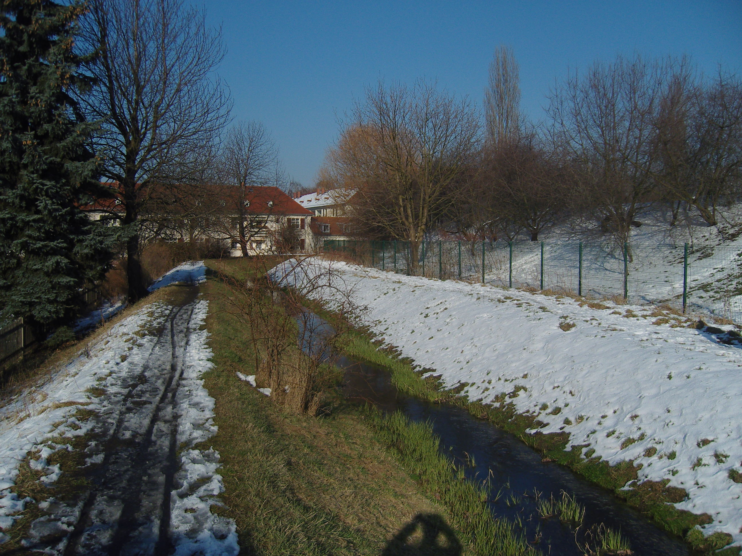 Landgraben in Dresden Gruna; links die Gartenheimsiedlung